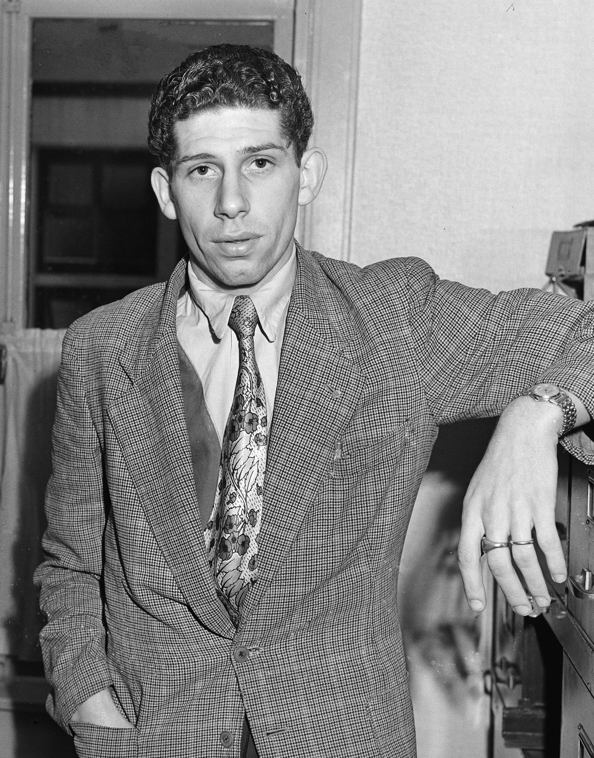 Nieuwe midvoor van het Nederlands Elftal, Cor van der Gijp